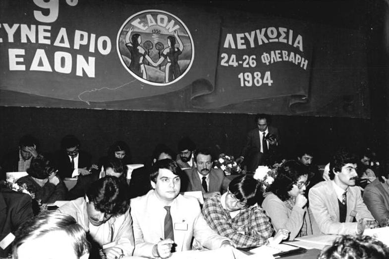 ADN-ZB-Paschalis 1.3.1984-Zypern: Kongreß zyprischer Jugendorganisation - Unter der Losung "46 Jahre Kampf für Freiheit, Frieden und sozialen Fortschritt" fand am 24.-25.2.84 der 9. Kongreß der Vereinigten Demokratischen Jugendorganisation Zyperns (EDON) in Nikosia statt. Die 900 Delegierten sprachen sich für den verstärkten Kampf gegen die NATO-Hochrüstung und die gegen Zypern gerichtete Politik des Imperialismus . Die Grüsse der FDJ überbrachte der Sekretär des Zentralrates Hartmut König (2.v.l.)